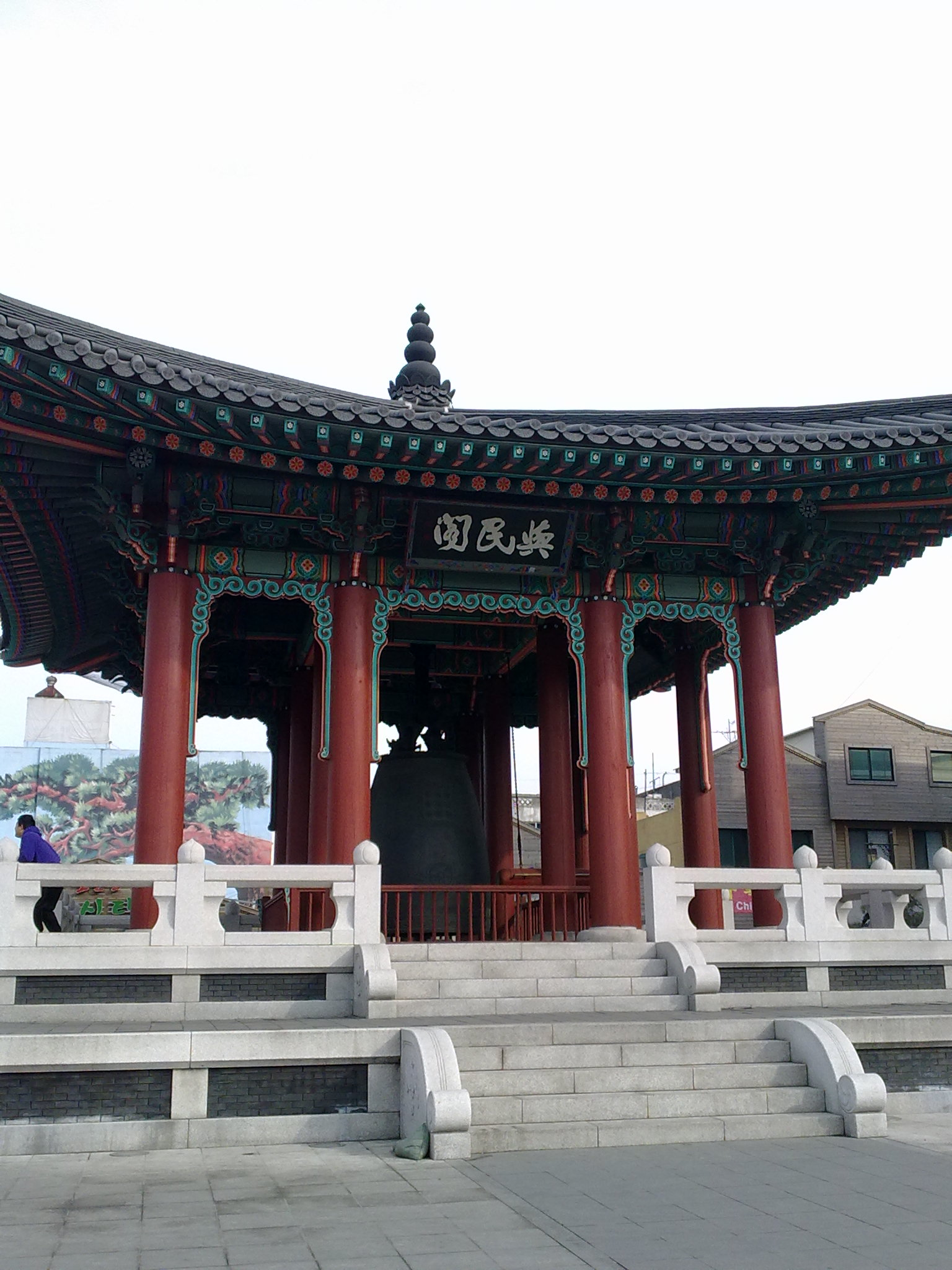 수원 화성 중심부에 있는 종각, 여민각